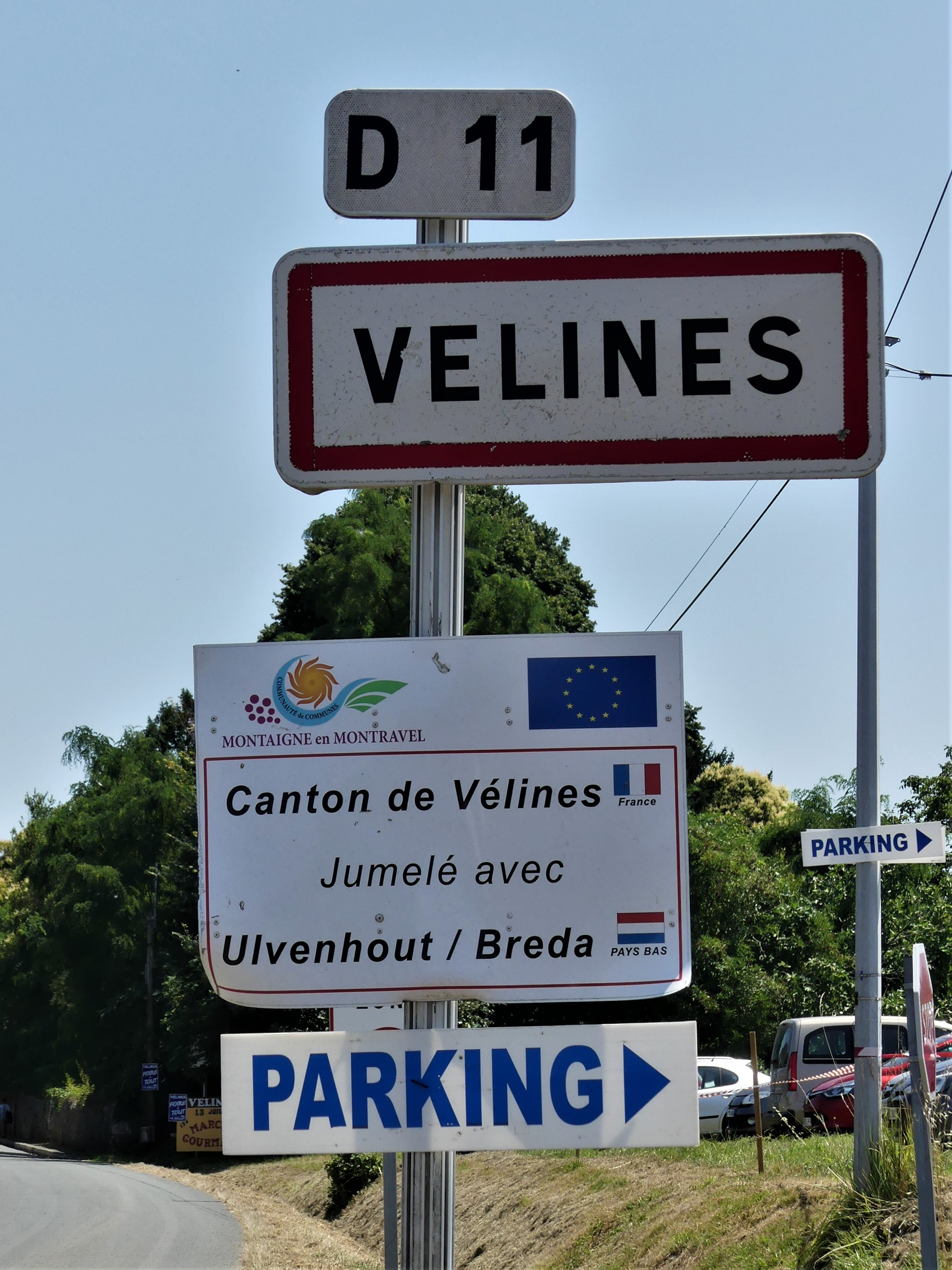 Panneau de jumelage de Vélines, Dordogne, France.